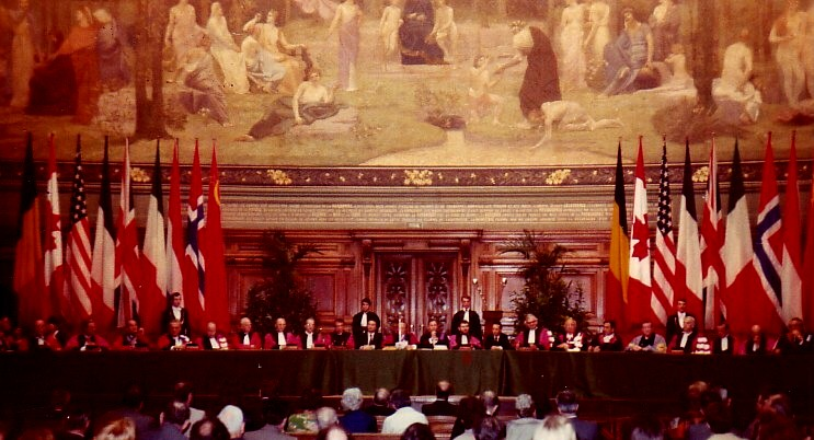 Sur la tribune: André Herpin entouré de ses 3 Vice-Pésidents , le ministre J-P Soisson, le Recteur, les récipiendaires: A. Brodal, M.Casimir, C.Fazio, I. Gel'fand, M.Herlant, J.Lighthill, E.Mayr, R. Woodward.